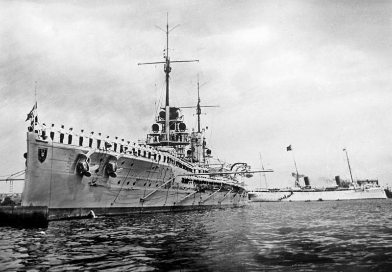 Paradeaufstellung an Bord eines Großlinienschiffes der "Kaiserklasse" [S.M.S. Kaiser ?], Ansicht des Bugs der Backbord-Seite Information added by Wikimedia users. Die SMS "Kaiser" (1912) in Paradeaufstellung (Backbordseite). Im Hintergrund des Kaisers Yacht SMY "Hohenzollern". Indienststellung 1912